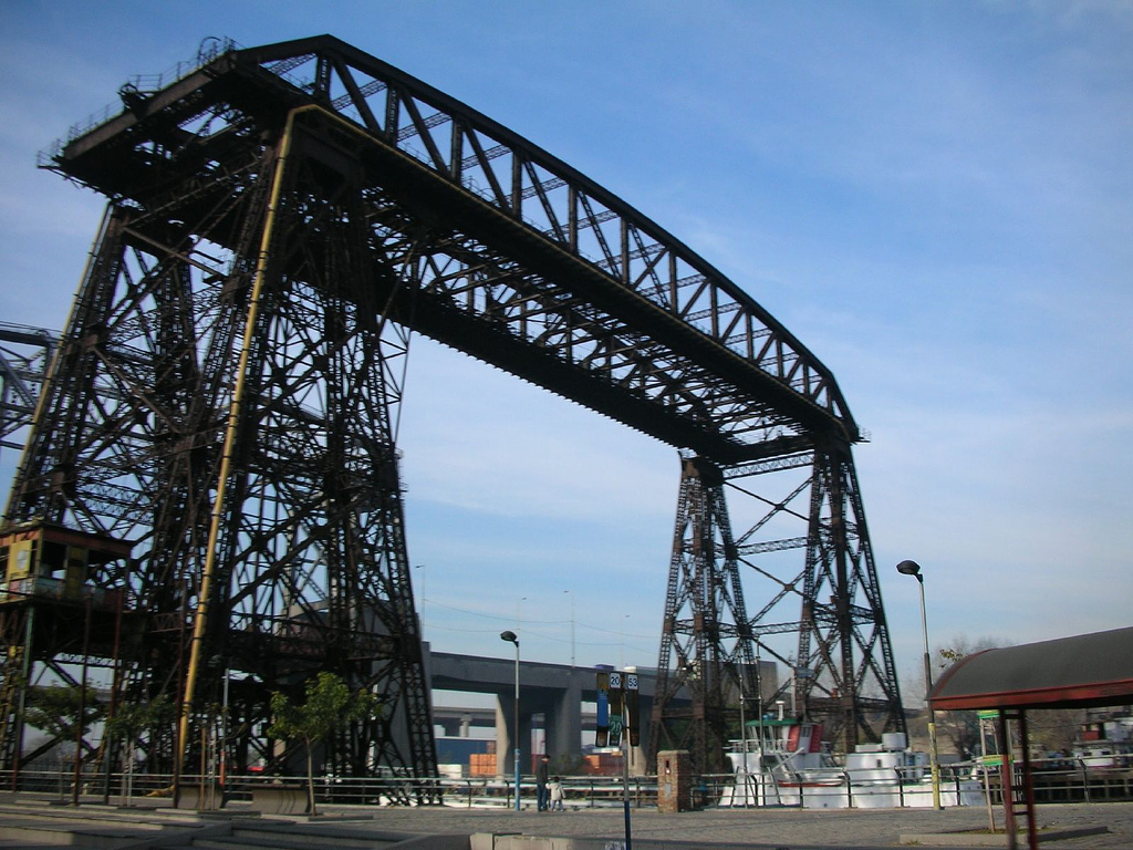 Antiguo puente transbordador Nicolás Avellaneda, Buenos Aires, Argentina